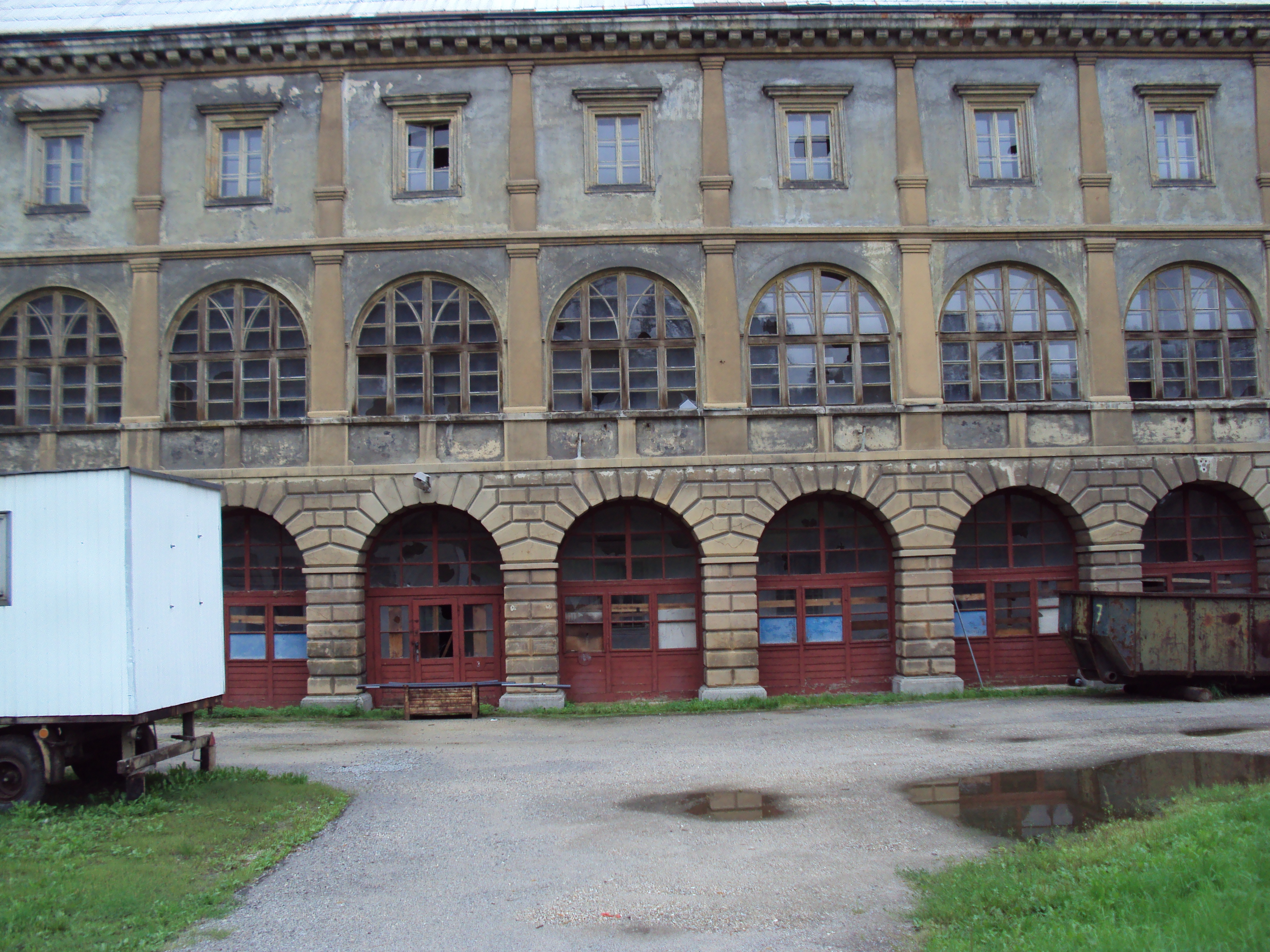 Průčelí uzavřeného zámku v Horní Libchavě